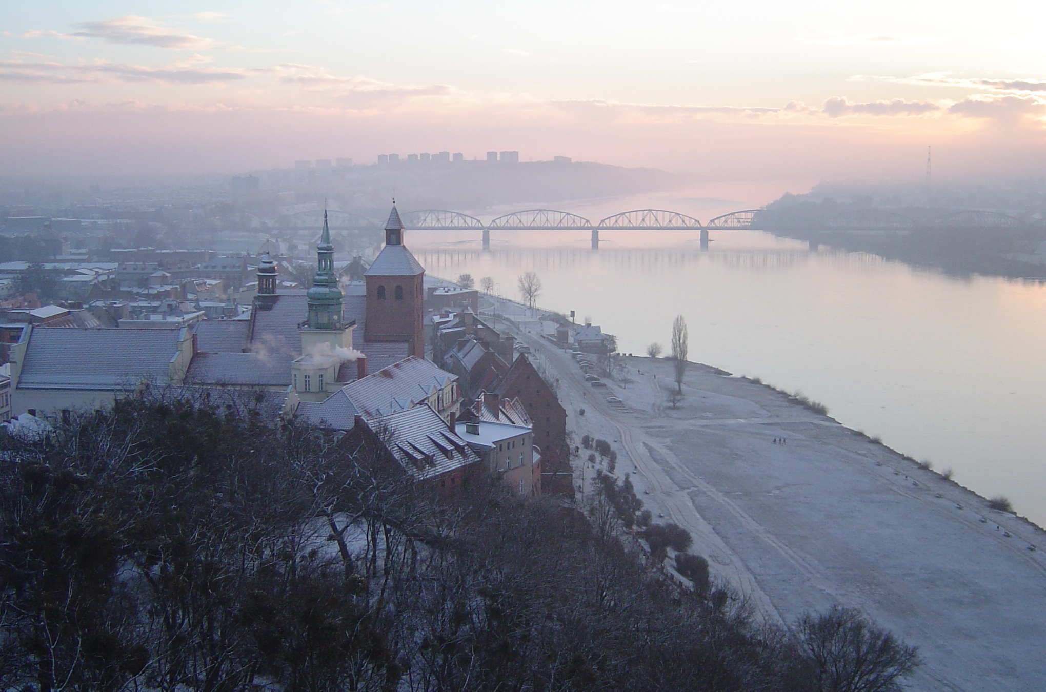 Widok z wieży Klimek na spichrze oraz Wisłę z mostem Bronisława Malinowskiego w Grudziądzu